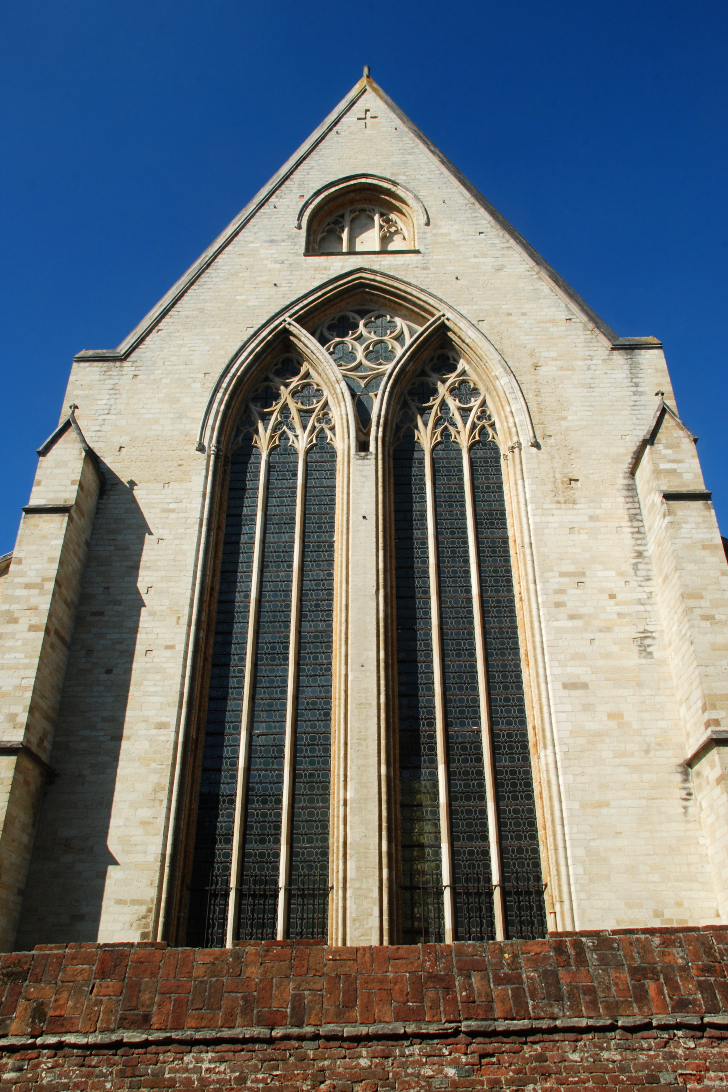 Belgique - Louvain - Église Saint-Jean-Baptiste-du-Béguinage